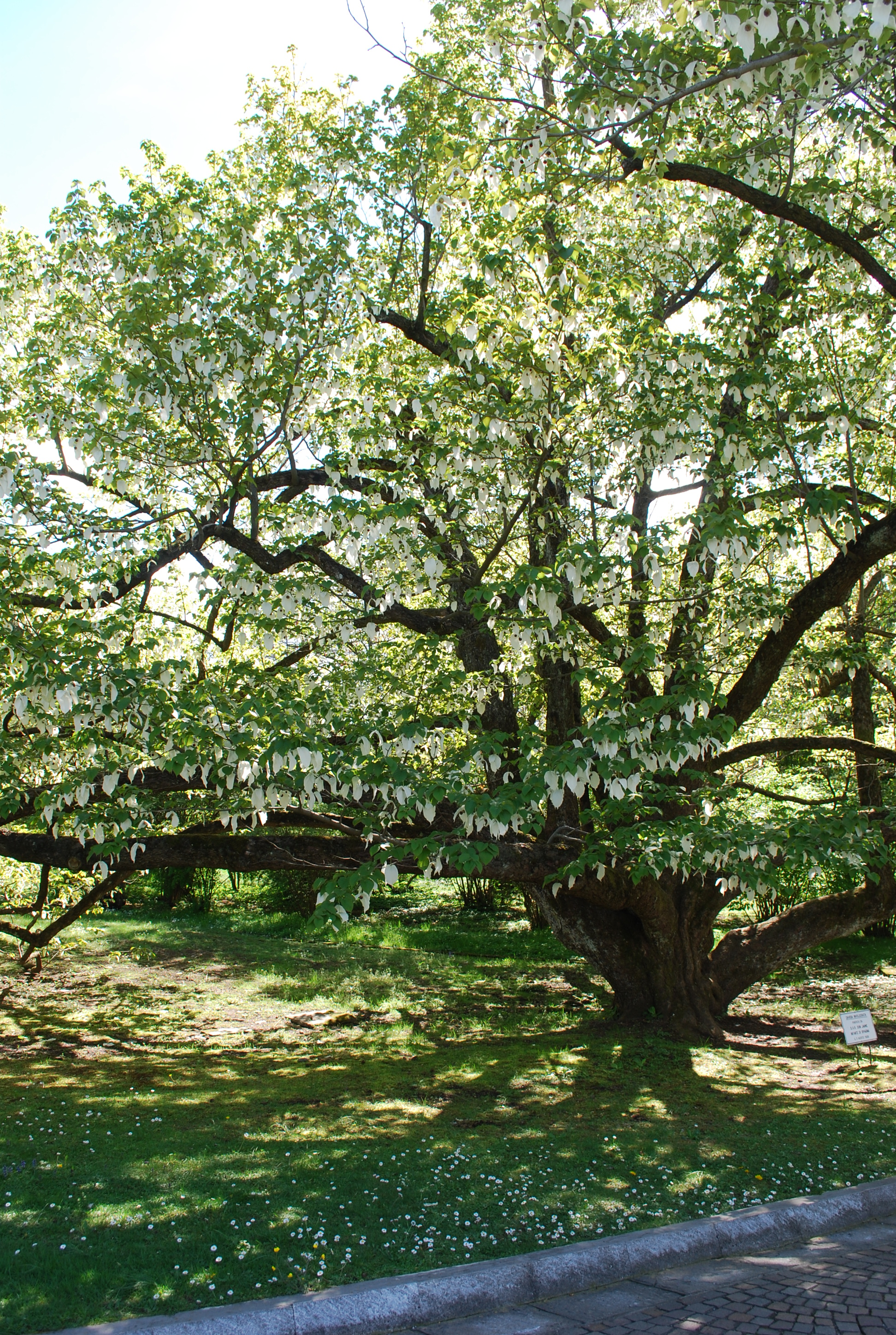 Giardini botanici di Villa Taranto - Davidia involucrata